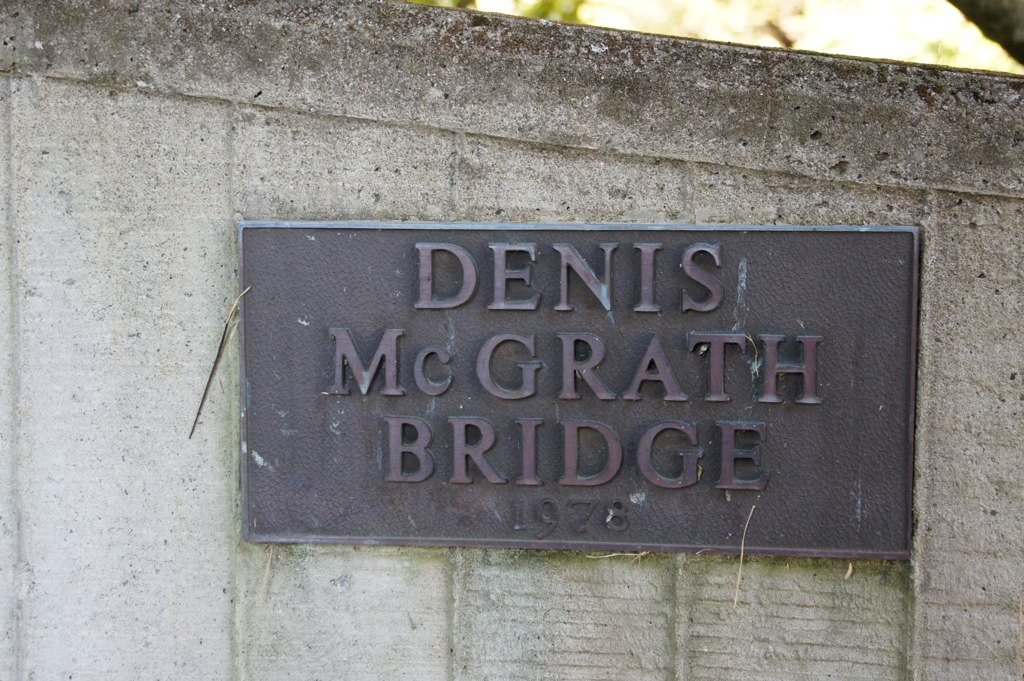 Wellington